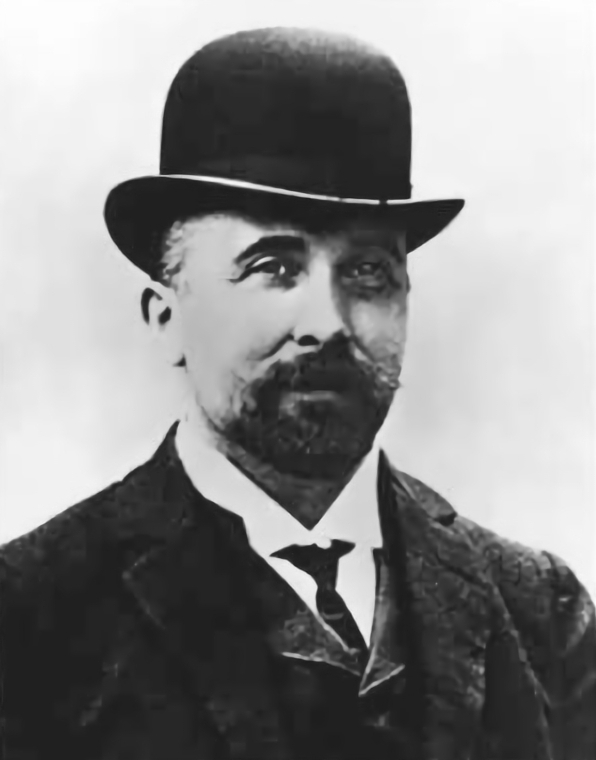 Felix Hoffmann (* 21. Januar 1868 in Ludwigsburg; † 8. Februar 1946 in der Lausanne) Foto Felix Hoffman, auteursrecht naar alle waarschijnlijkheid verlopen Gevonden op: web-archiv Foto uitgeknip en lichte bewerking ter verwijdering van JPEG-arctefacten